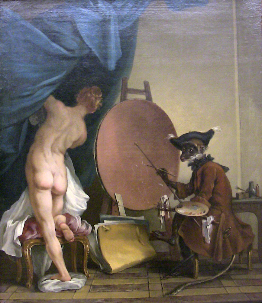 Le singe peintre